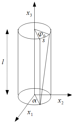 Wałek skręceń, skręcanie sztywno umieszczonego cylindra na podstawie